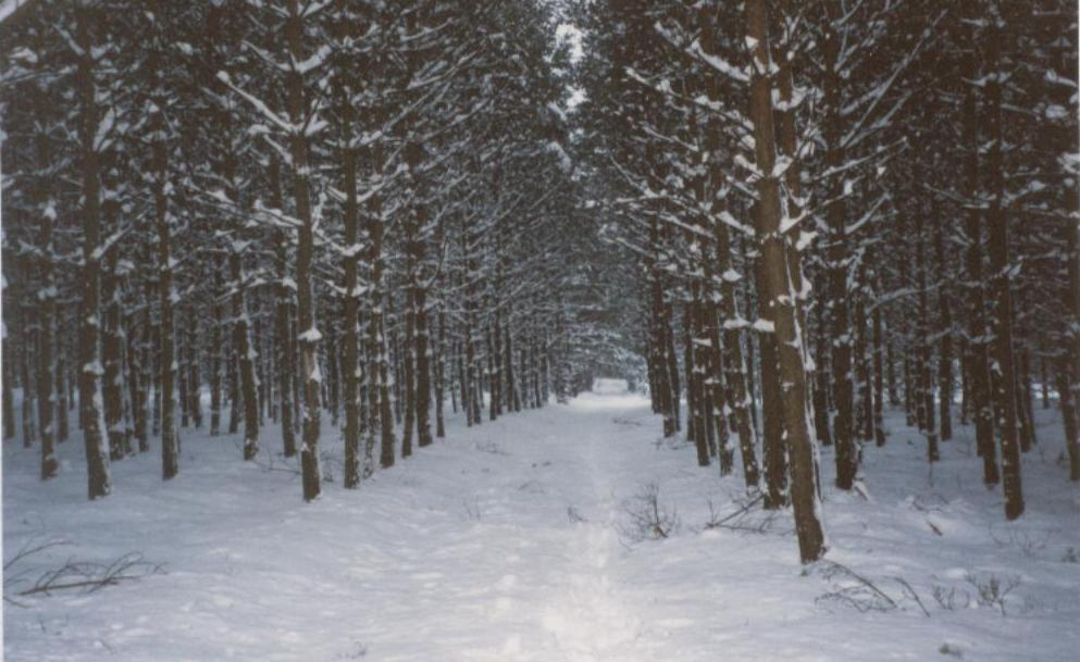 Zdjęcie plantacji sosnowej w zimie autorstwa